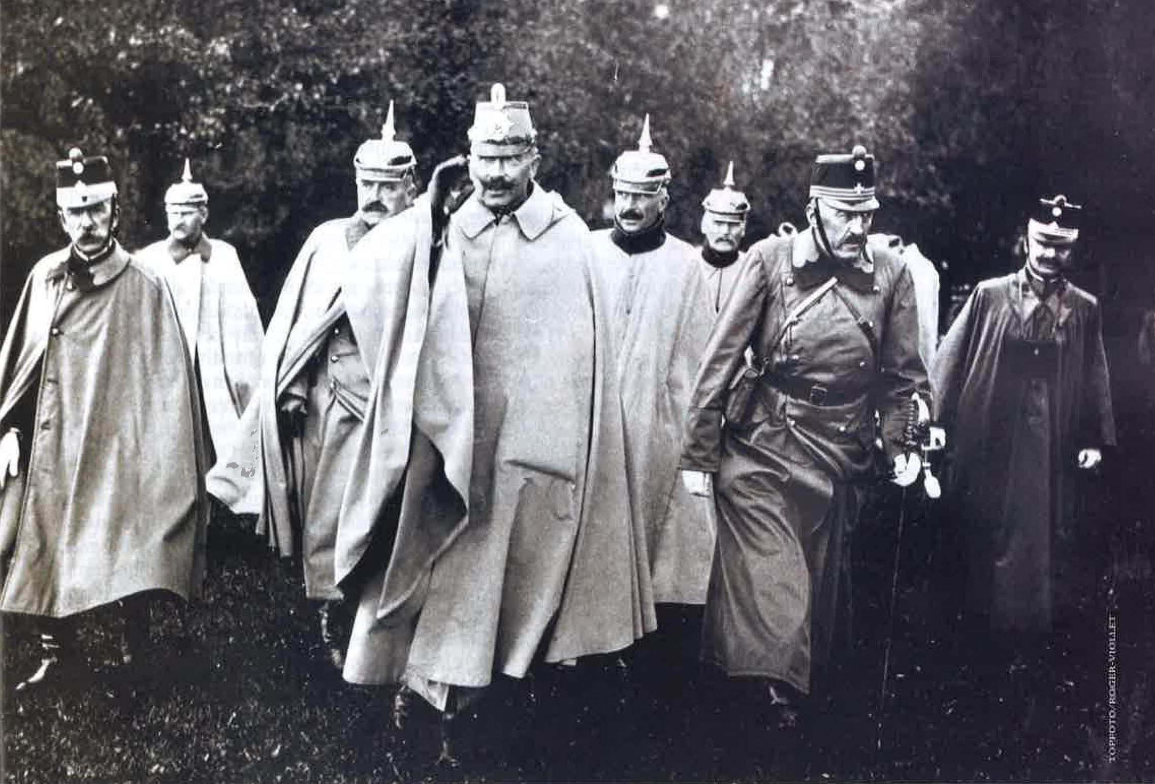 L'empereur d’Allemagne Guillaume II et un colonel de L’armée suisse, lors de manœuvres communes à Wil (Suísse) en septembre 1912